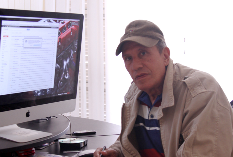 Trabalhando na Casa de Cinema Filmes